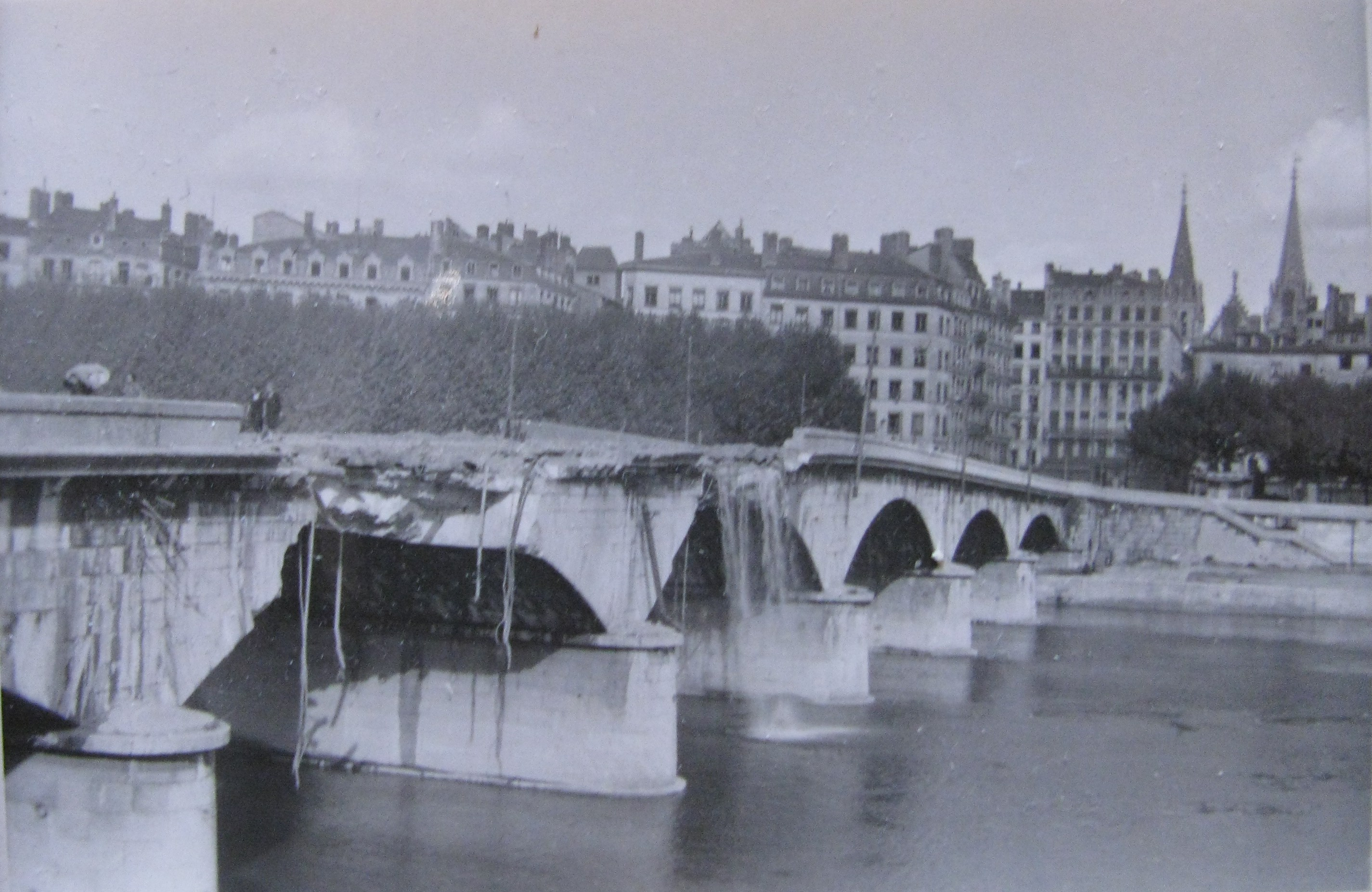 Pont du Change sur la Saône, détruit en 1944 par l'armée allemande en repli